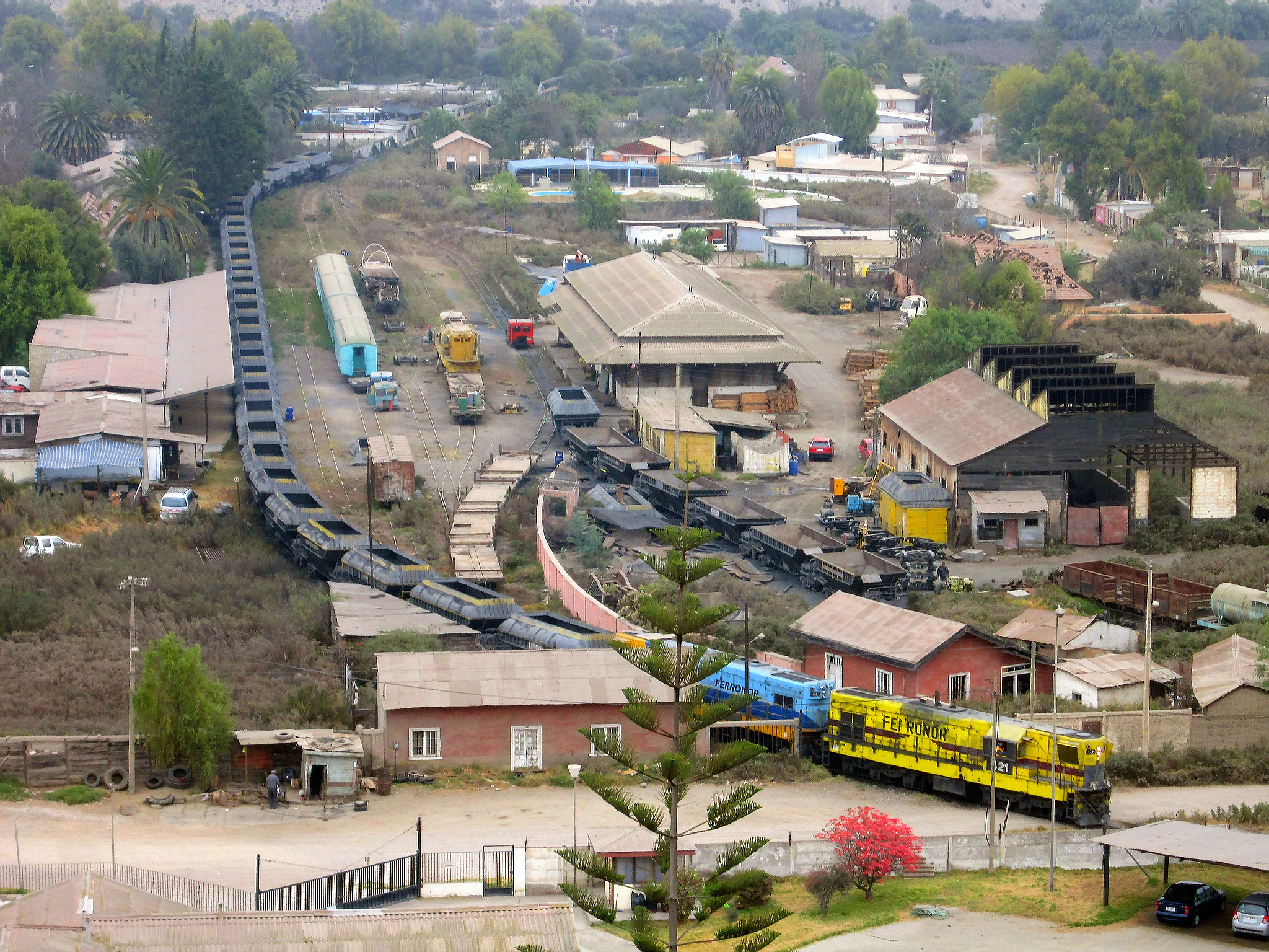 Una panorámica normal, de un día normal en la ex estación de pasajeros de Vallenar. Dt 421 y Dt 426 subiendo la pesada inclinación norte en dirección mina Los Colorados.